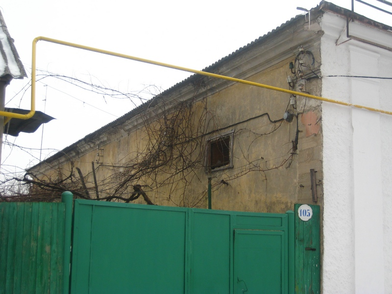 Здание бывшей синагоги жестянщиков